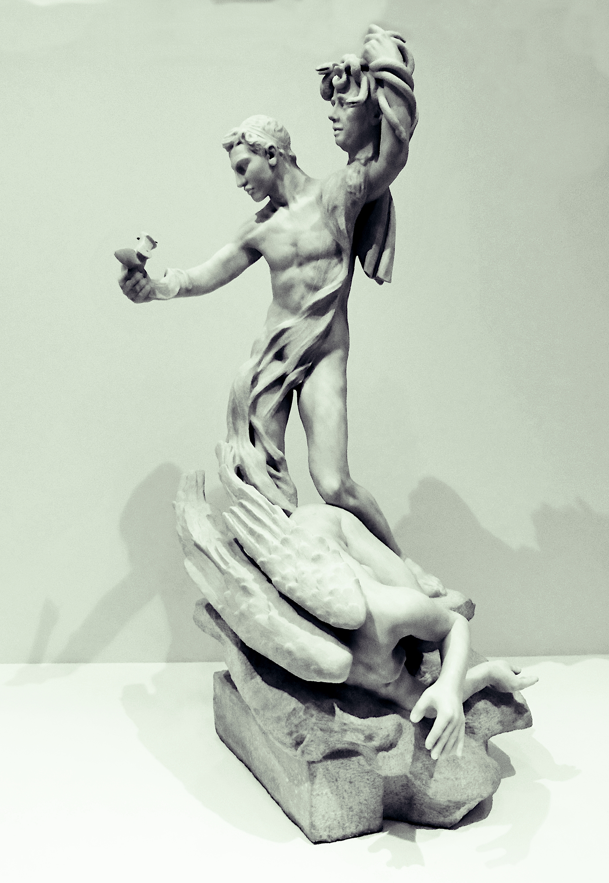 Sculptures de Camille Claudel, Persée et la Gorgonne "Au miroir d'un art nouveau" au Musée d'Art et d'Industrie de Roubaix dit "la Piscine", Roubaix, France. Camille Claudel (1864–1943) DescriptionFrench sculptor and graphic designerDate of birth/death 8 December 1864 19 October 1943Location of birth/death Fère-en-Tardenois AvignonWork location Paris (1883)Authority control : Q120582 VIAF: 66585142 ISNI: 0000 0001 2137 4309 ULAN: 500102192 LCCN: n82158800 WGA: CLAUDEL, Camille WorldCat creator QS:P170,Q120582